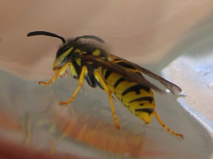 Guêpe photographiée sur le bord d'un verre en août 2004 dans le Morvan. Photo sous GFDL prise par Utilisateur:Jgremillot. Catégorie:Apocrita